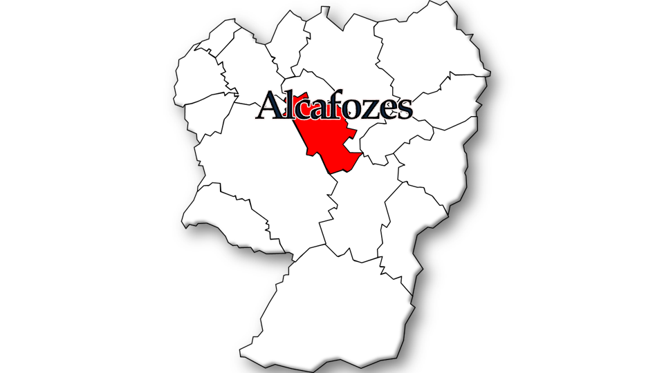 População